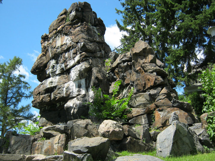 Rocher de Grand-mère, Grand-mère, Québec, Canada